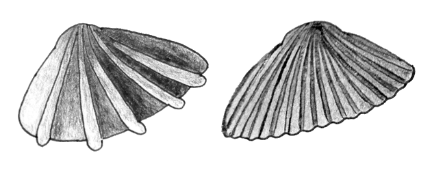 Dessin d'après une illustration de Nevesskaya (1967)